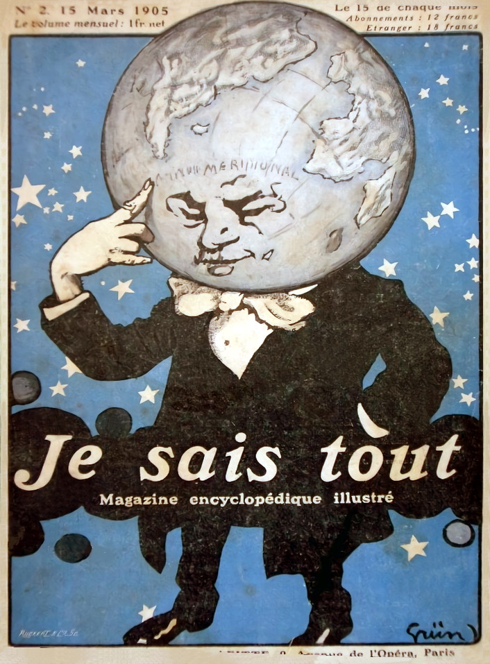 Couverture du n° 2 du magazine français Je sais tout daté du 15 mars 1905.